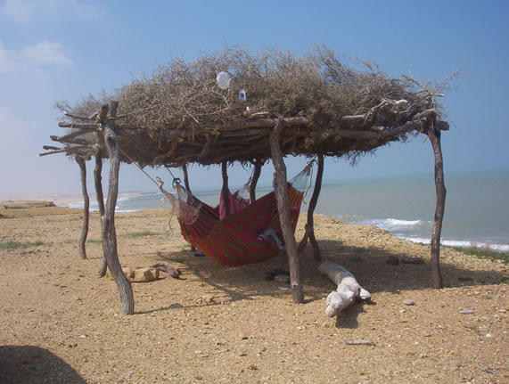 Choza Wayuu y Chinchorros colgados